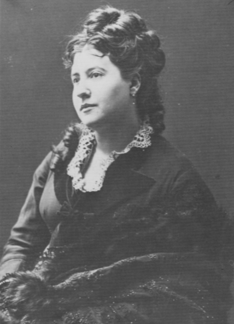 Atelier Nadar: Judith Gauthier (1850-1917), Schriftstellerin